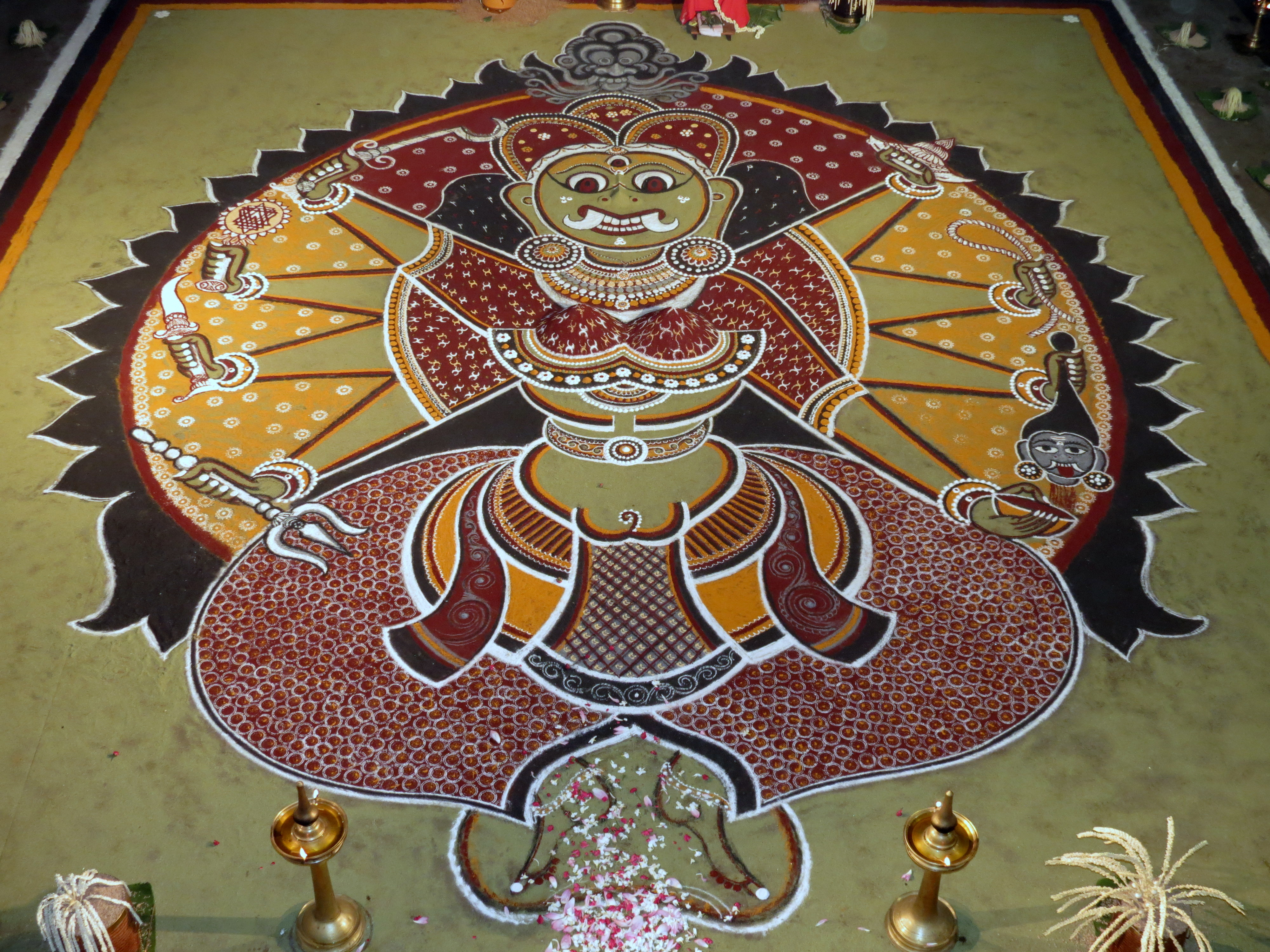 Bhadrakali kalam with 8 arms